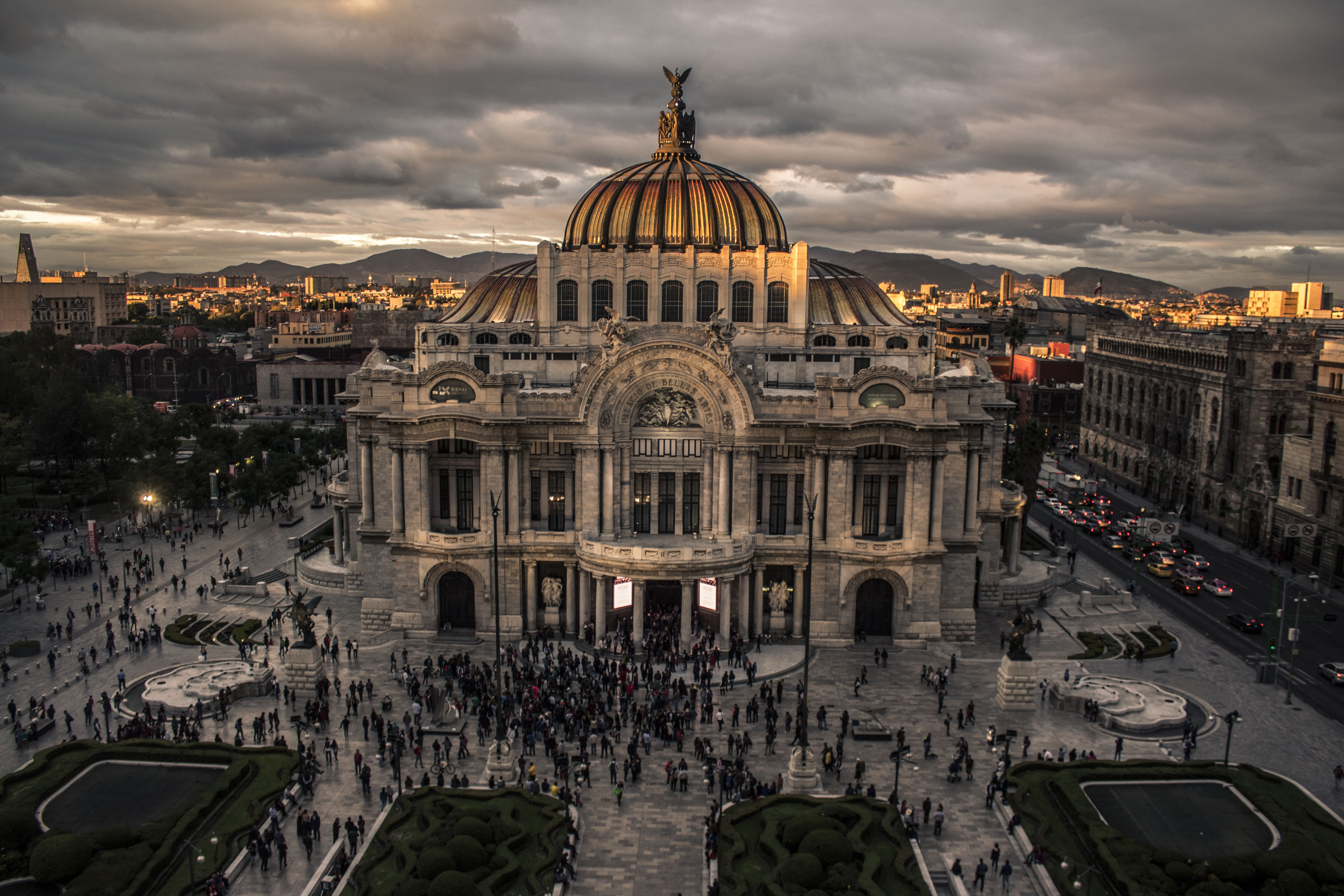 Una fotografía de uno de los edificios mas emblemáticos de México, tomada el dia de la premiere de la famosa película de Disney Coco, desde una vista aerea, con el cielo y edificos de fondo, una obra de arte que reguarda mas obras de arte en su interior.